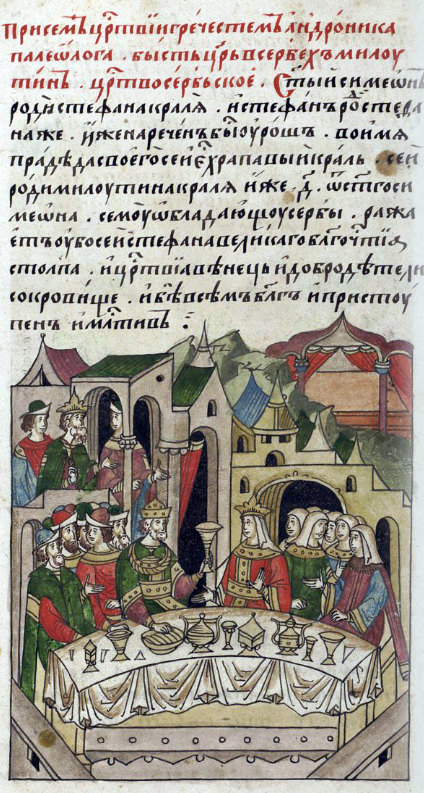 ЛИЦЕВОЙ ЛЕТОПИСНЫЙ СВОД И после смерти матери Стефановой король Милутин приобщается второму браку: у греческого царя Андронника Палеолога дочь взял.